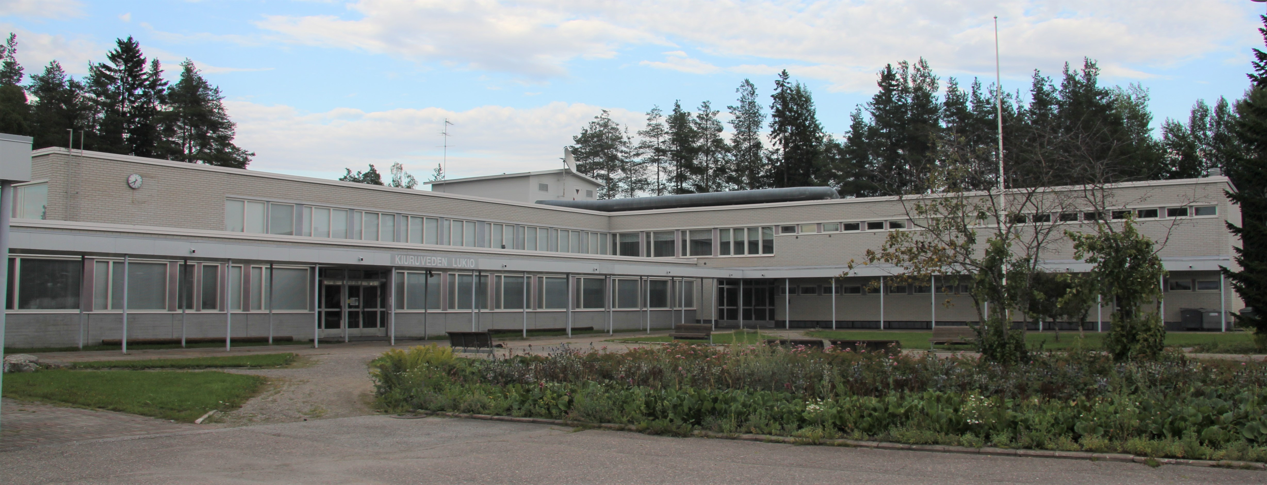 Kiuruveden lukio on Kiuruveden keskustaajamassa toimiva yleissivistävä toisen asteen oppilaitos.